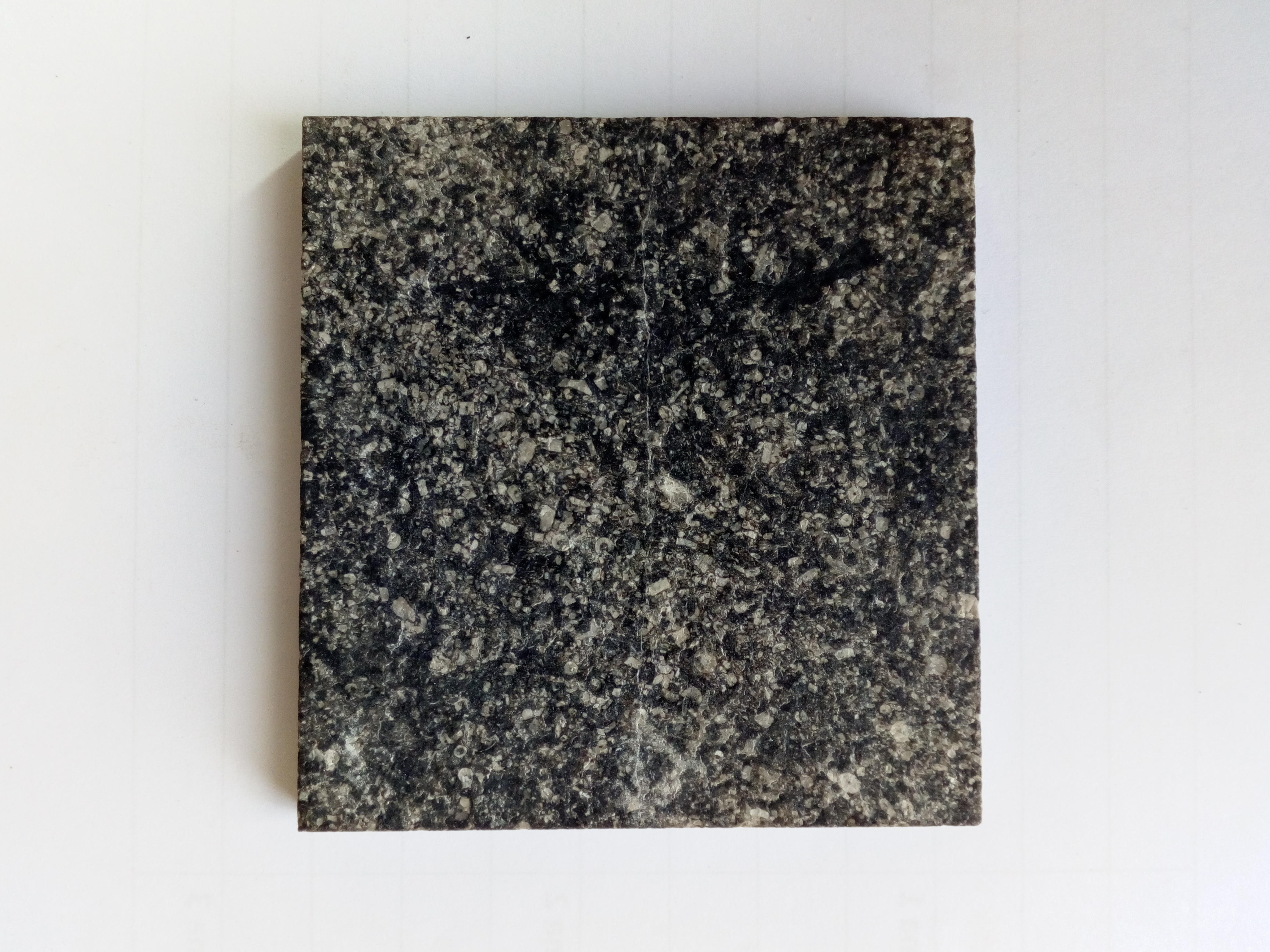 Blauw gevlamd blauwsteen